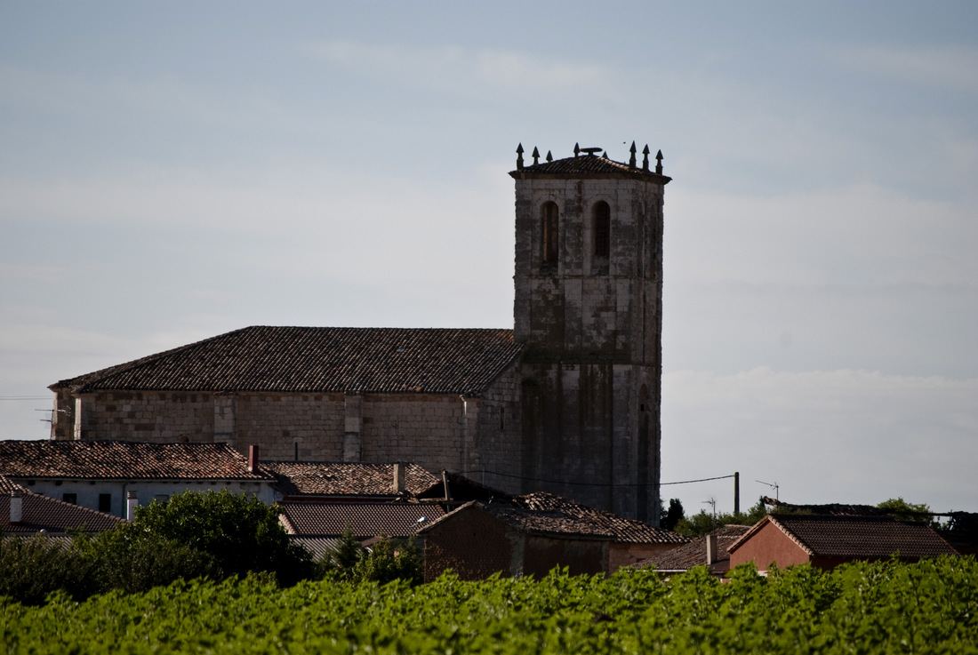 Sandoval de la Reina visto desde la carretera de Villavedón.